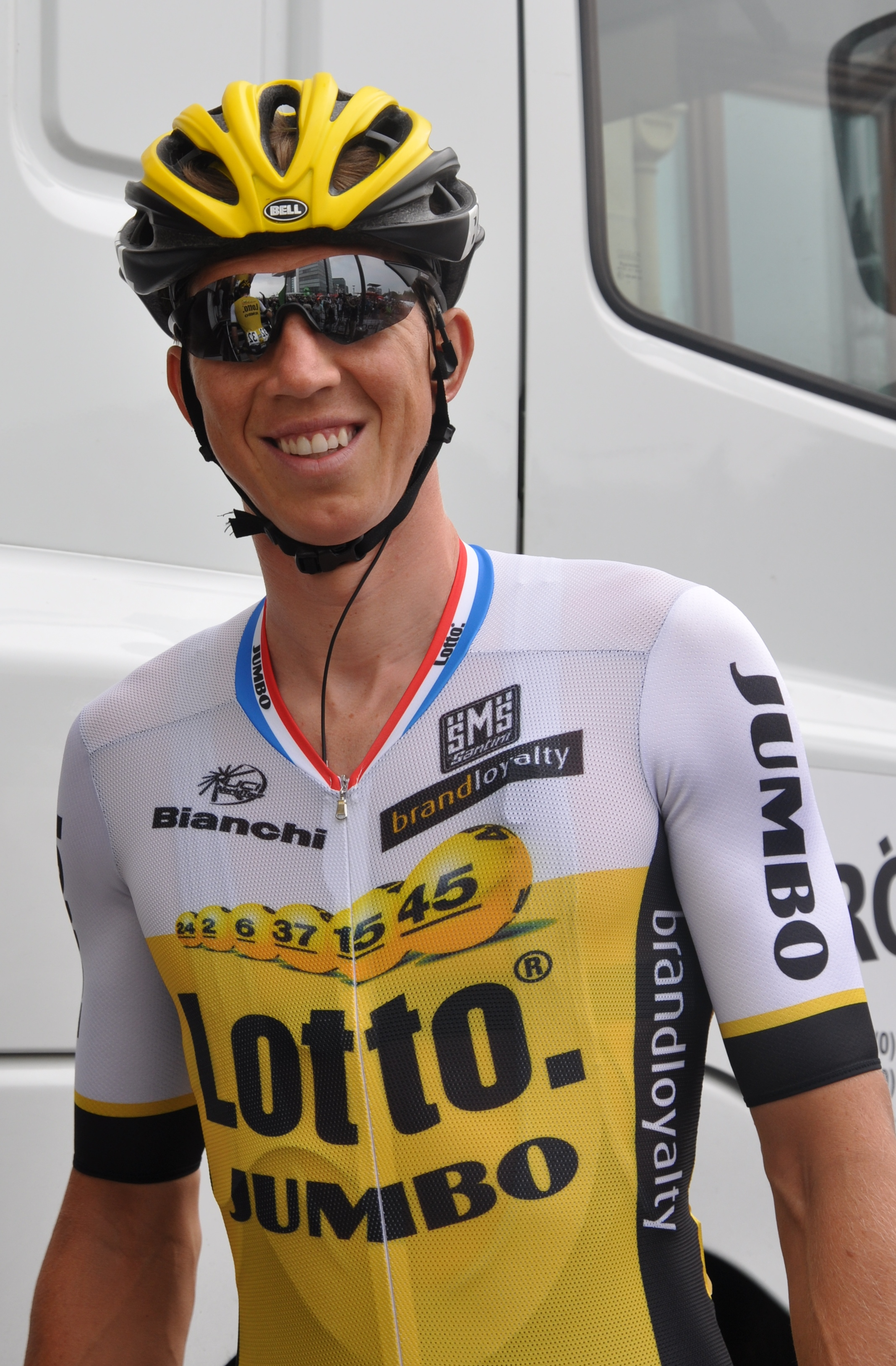 Sep Vanmarcke, niederländischer Radrennfahrer